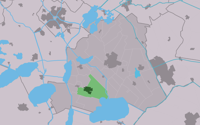 Kaartsje fan himrik fan Sint_Nyk